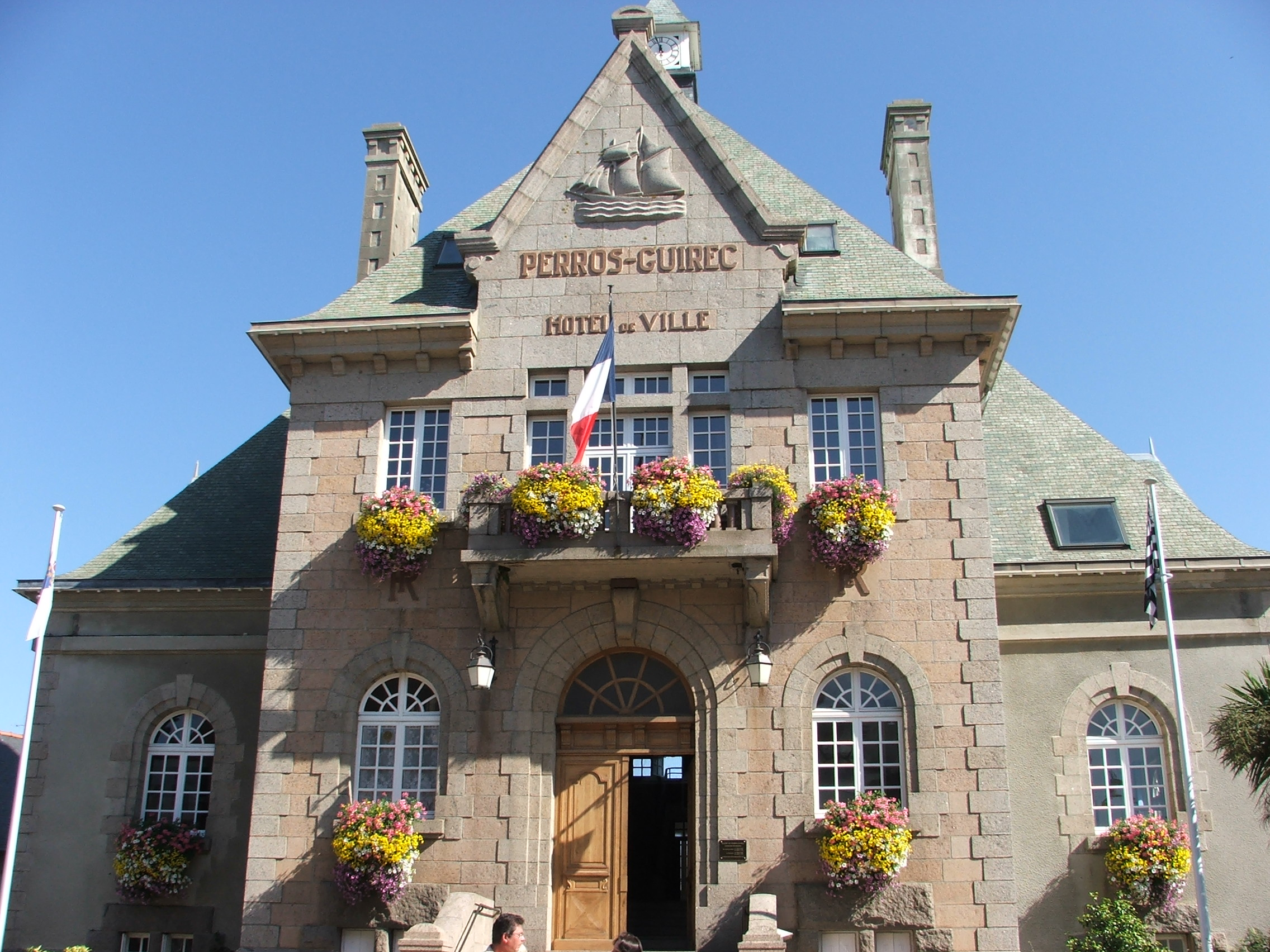 La mairie de Perros-Guirec